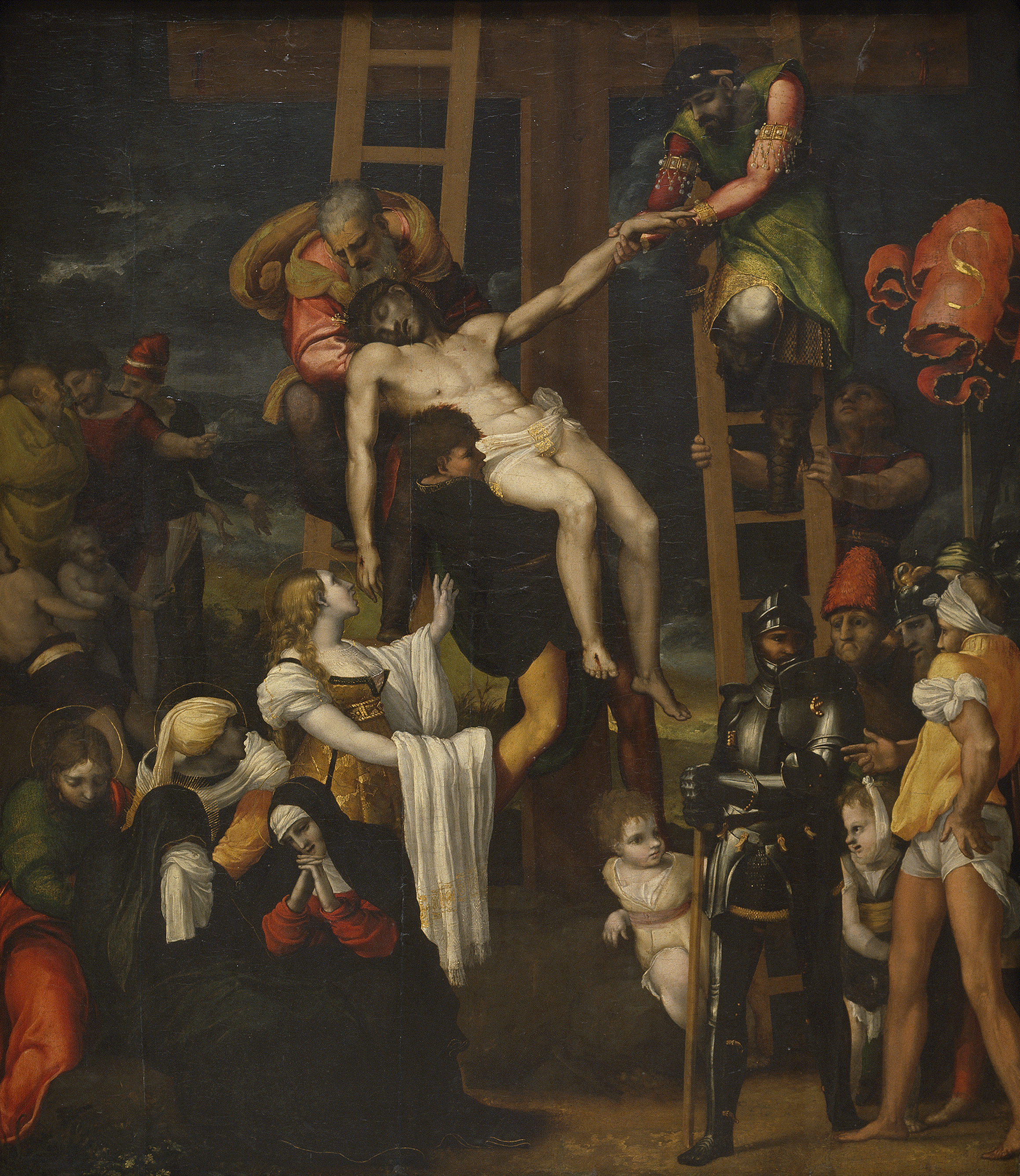 La obra representa el momento en que el cadáver de Jesucristo fue descolgado de la cruz por José de Arimatea y por Nicodemo, al tiempo que Santa María Magdalena tiende los brazos hacia el cadáver y la Virgen María llora desconsoladamente.